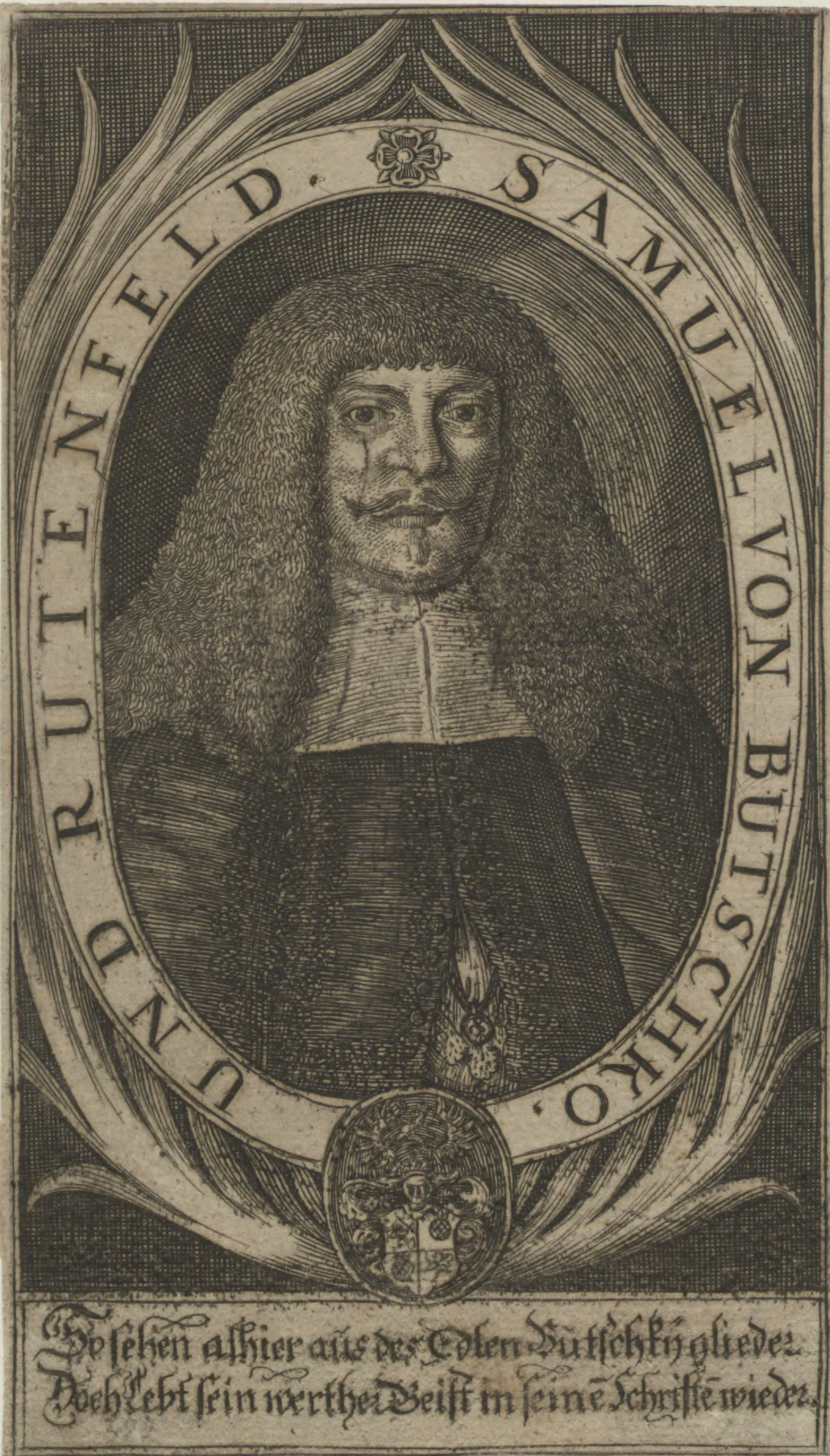 Kupferstich ; 17. Jahrhundert ; ehemaligen Stadtbibliothek - Wroclaw, Inw. graf. 322